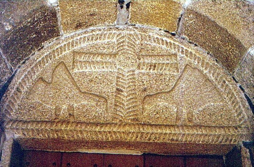 Balle Kirke, Tympanon over sydportalen